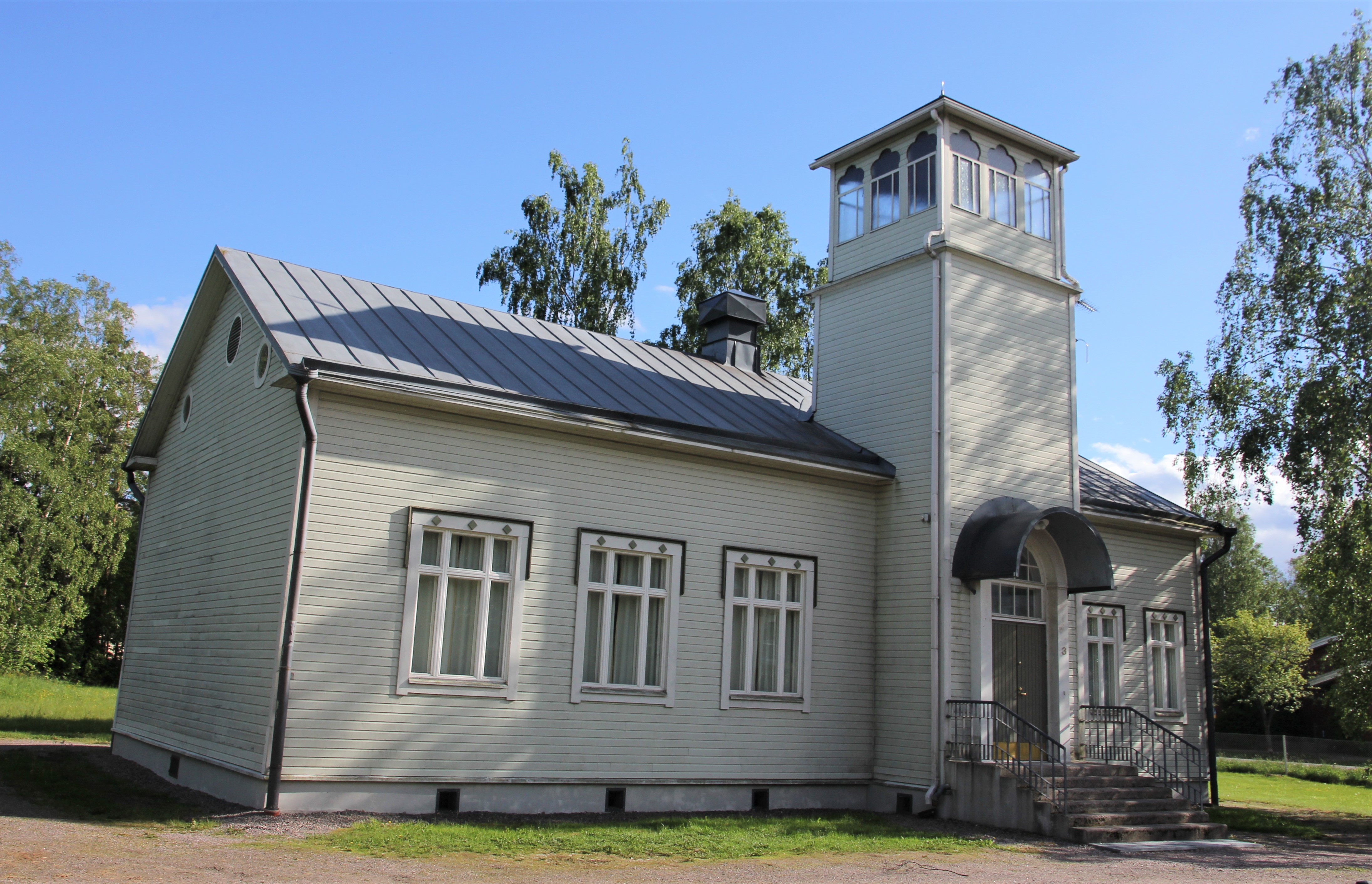 Järvenpään islamilainen rukoushuone on suomalaisten tataarien talkootyöllä rakentama rukoushuone Järvenpäässä. Sitä on joissain yhteyksissä nimitetty ulkonäkönsä perusteella myös moskeijaksi, vaikkei rakennuksen tornia ole vihitty minareetiksi eikä sieltä ole rukouskutsuja kuulutettu. Suomen islamilaisen seurakunnan rukoushuone sijaitsee Järvenpään Kinnarin kaupunginosassa, katuosoitteessa Keskitalontie 3, Järvenpää.